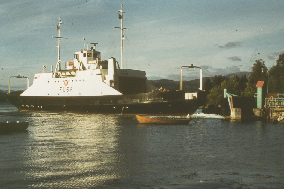 MF Fusa, built 1969.